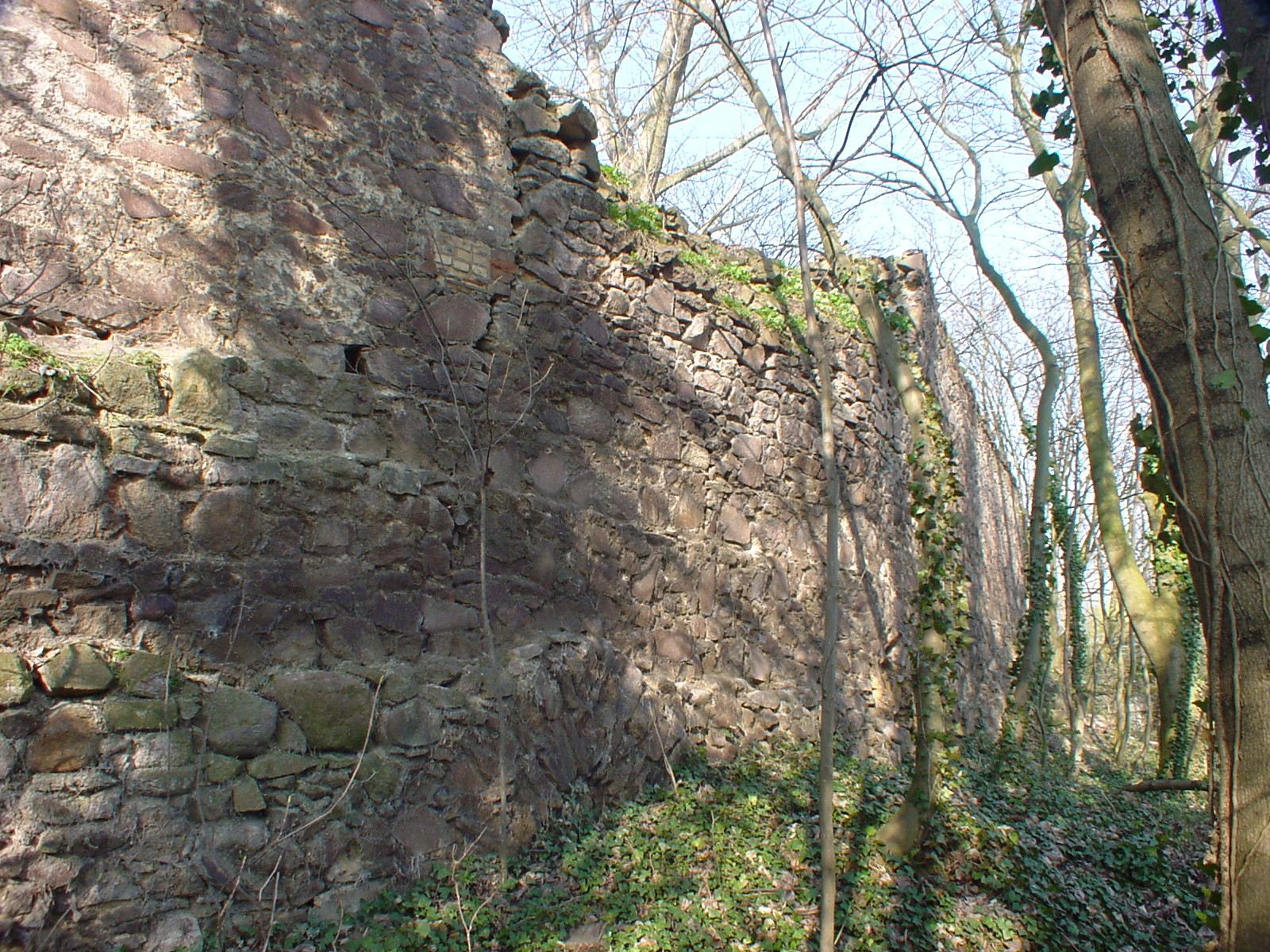 Burg Krosigk 11, public domain, eigenes Foto von 2004, Ringmauer der Burg. Mewes 06:56, 14. Apr 2005 (CEST)